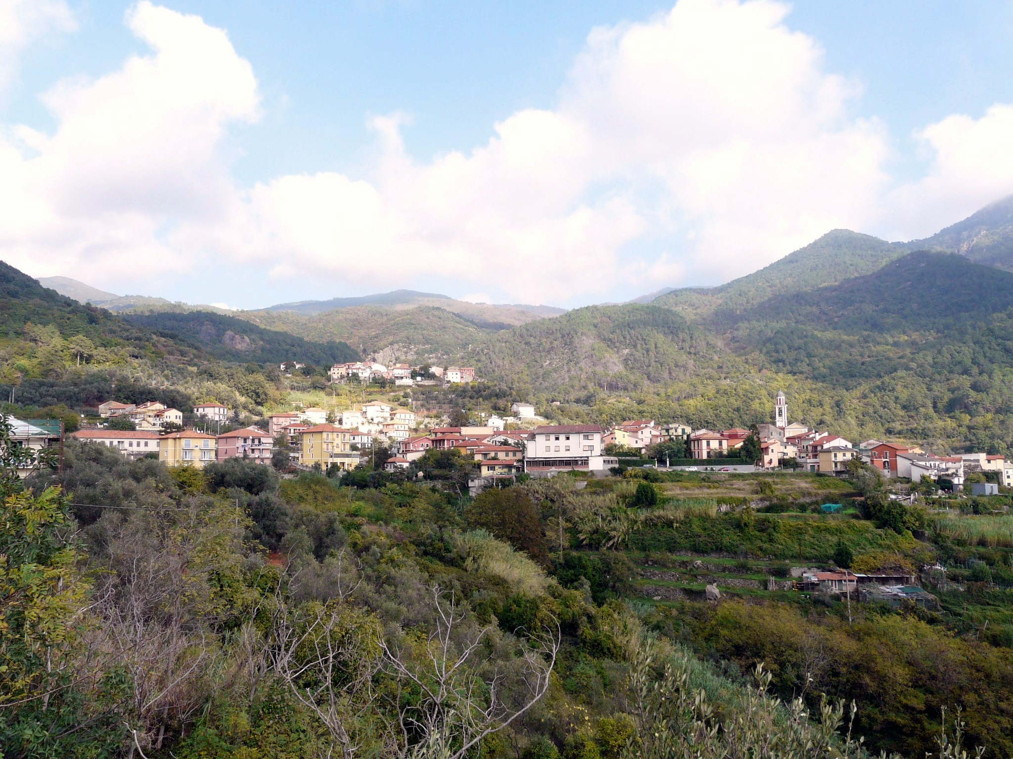 Panorama di Bargone, Liguria, Italia